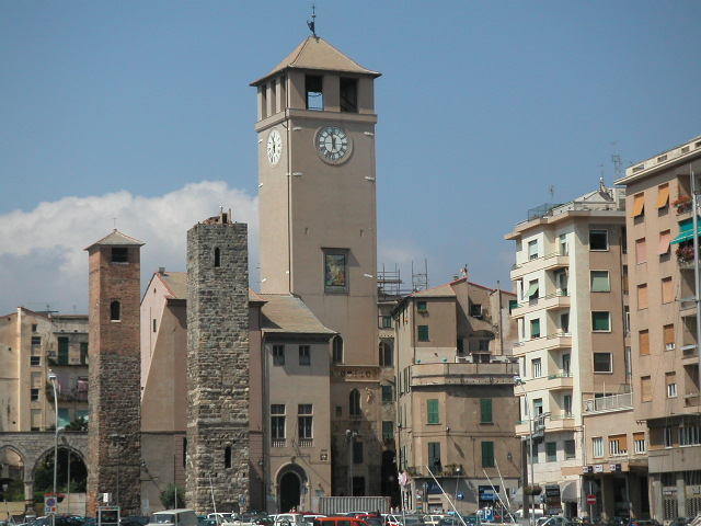 Torres medievales de Savona